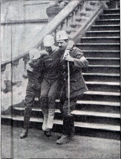 Раненый турецкий солдат покидает госпиталь (1912)